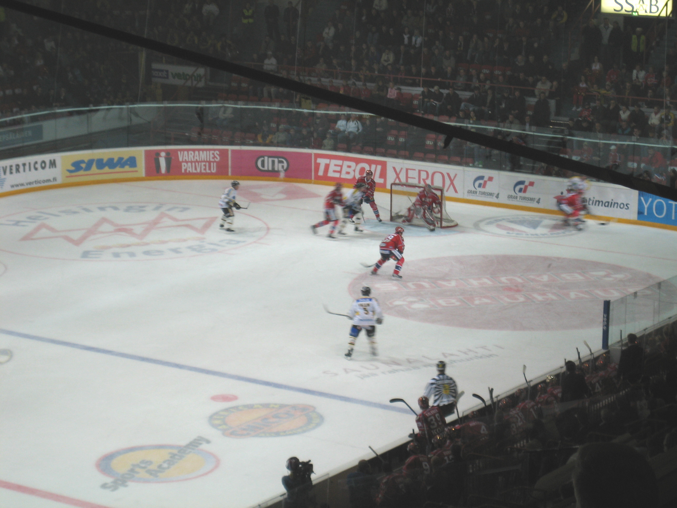 HIFK-Kärpät -pelistä 6.10.2005